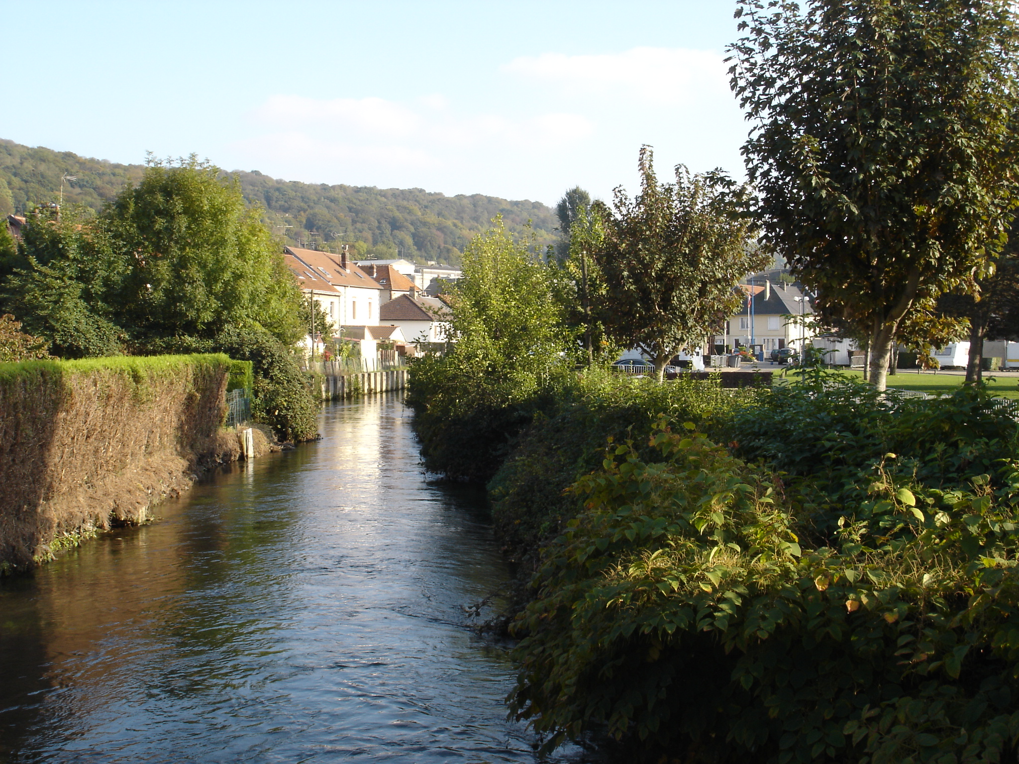 Le Cailly à Déville-les-Rouen